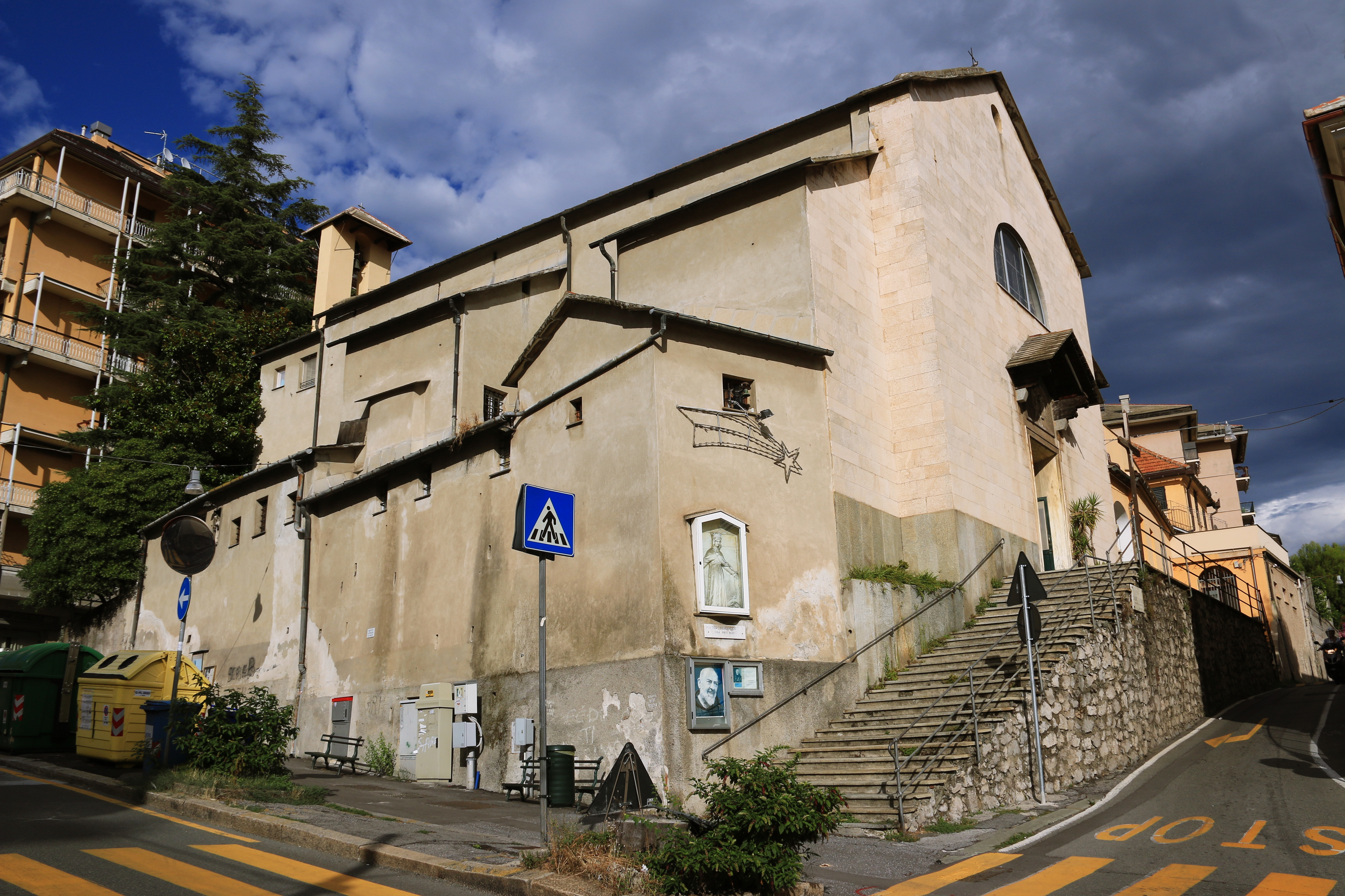 Chiesa di San Martino - Sestri Ponente, Genova, Liguria